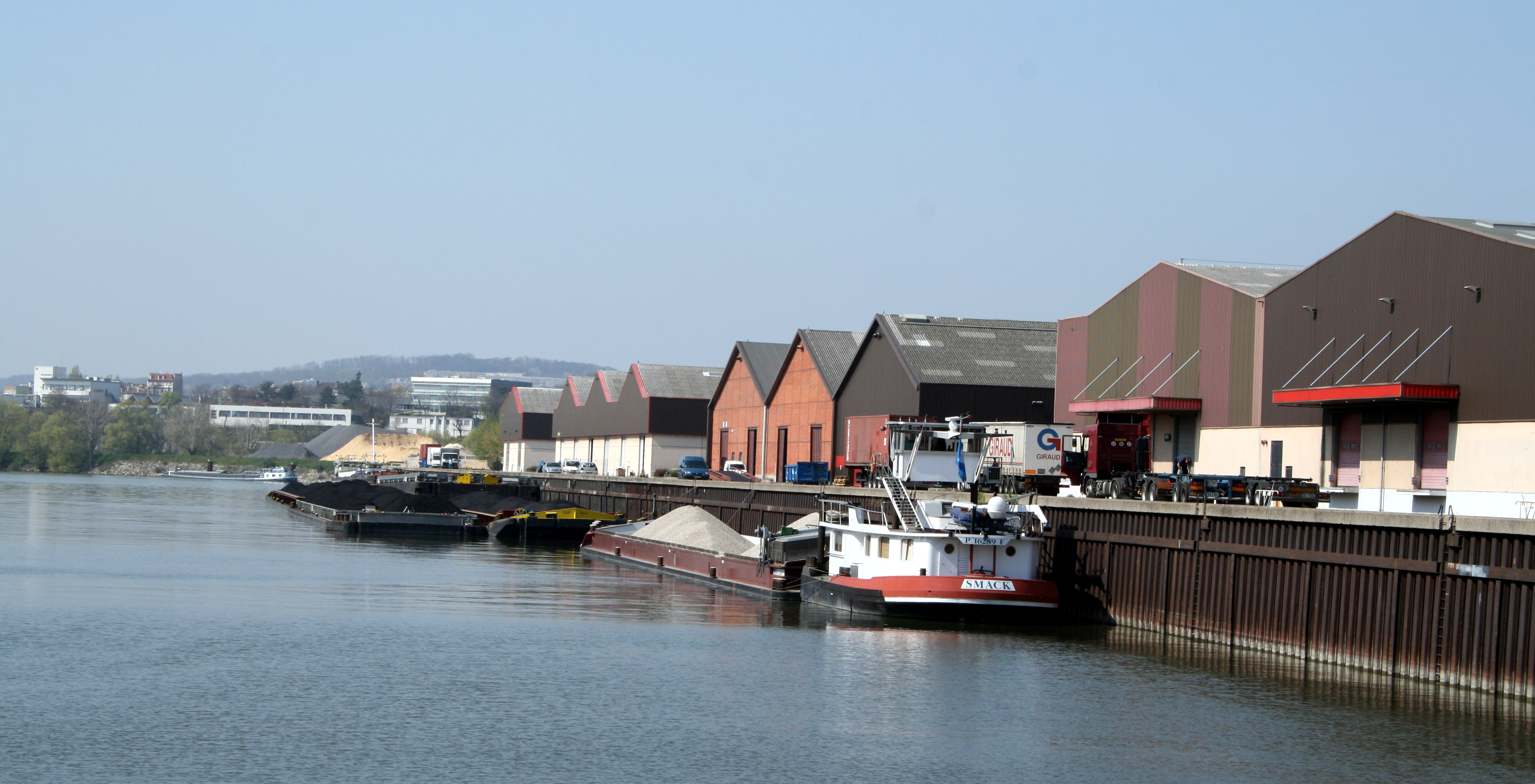 Port de Gennevilliers